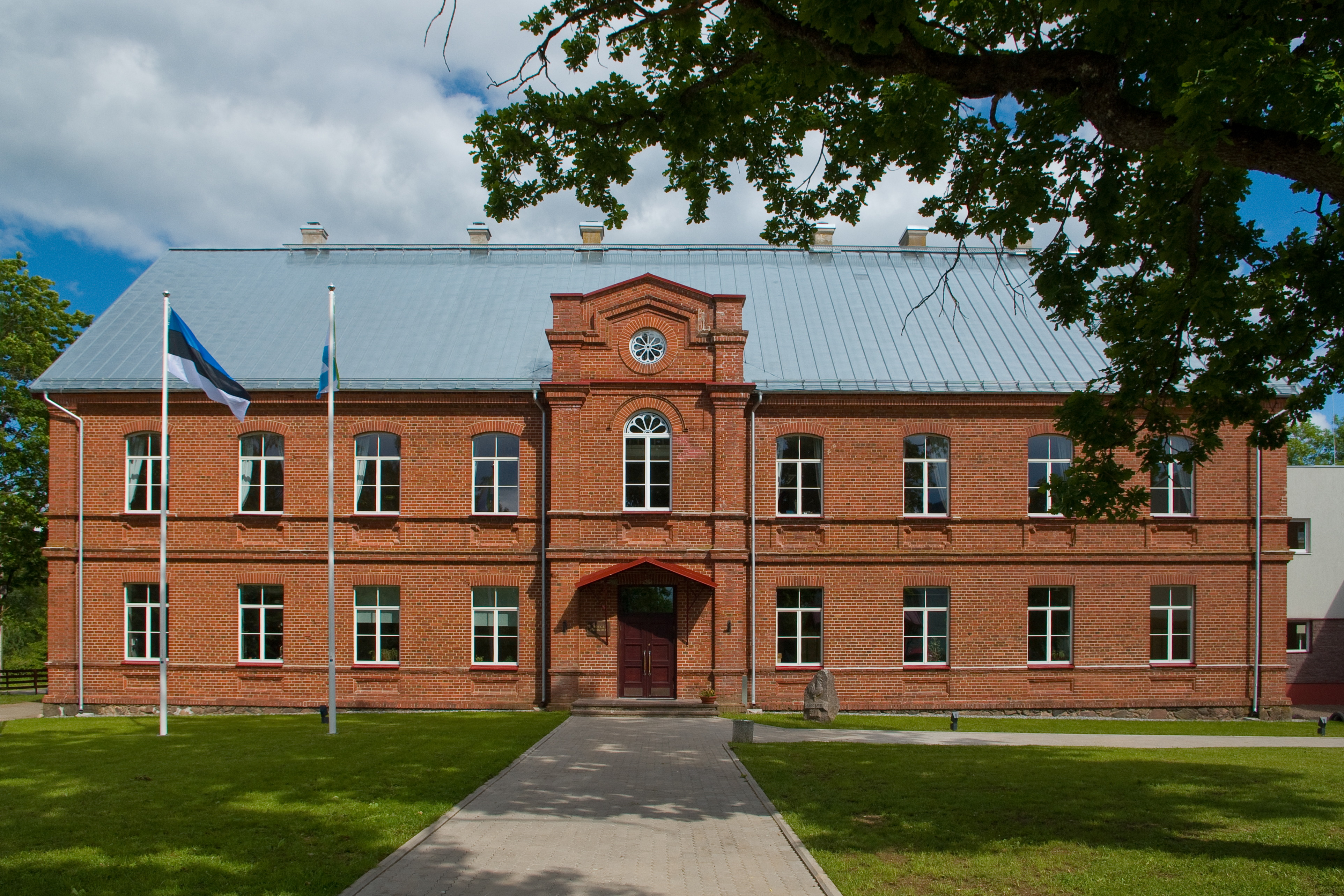 Rõuge põhikool